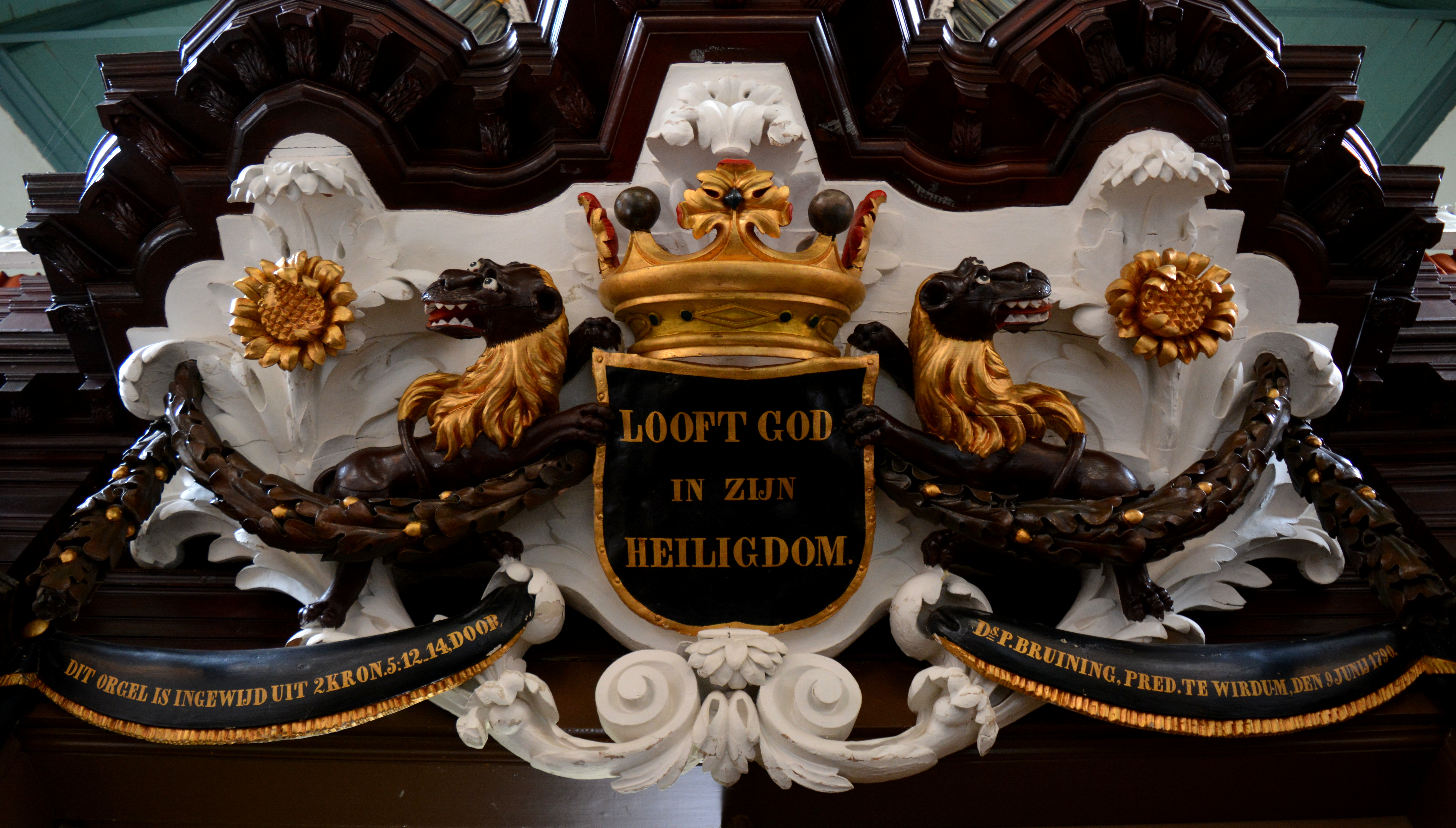 Wirdum, Martinuskerk, orgeldecoratie